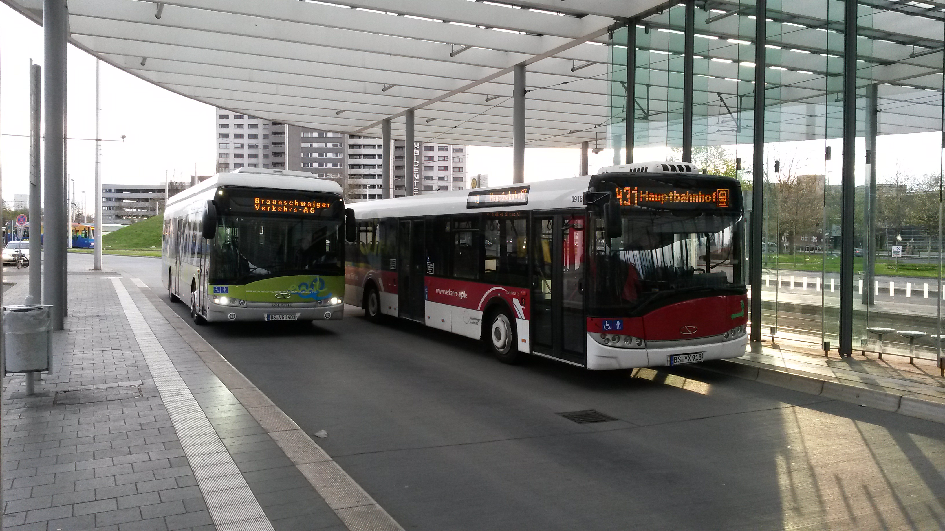 Solaris Urbino 12 electric (Wagen 1401, grün) und ein dieselbetriebener Solaris Urbino 12 (Wagen 0918, rot) der Braunschweiger Verkehrs-AG im Nahverkehrsterminal am Hauptbahnhof. Der im Zuge des Förderprojekts "EMIL" beschaffte Elektrobus kommt als Zusatzwagen auf der vielbefahrenen Ringlinie M19 (Hauptbahnhof - östliches Ringgebiet - westliches Ringgebiet - Hauptbahnhof) zum Einsatz und dient der Erprobung der Induktivladetechnik für den in Zukunft geplanten Einsatz von Gelenk-Batteriebussen auf dieser Strecke.